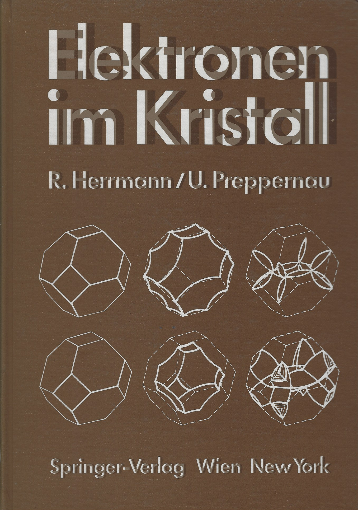 Elektron im Kristall